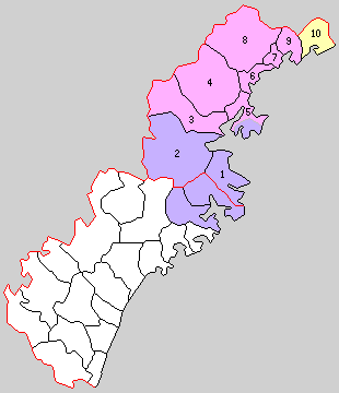 三重県北牟婁郡の町村制時点の町村。